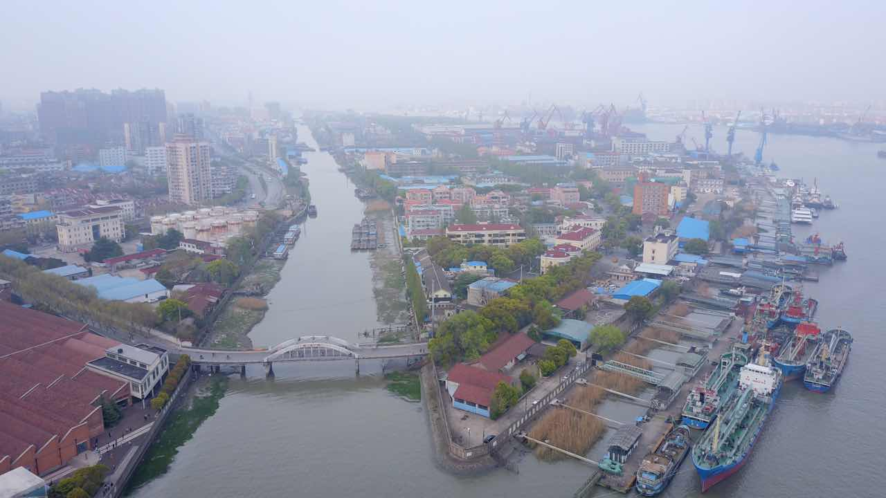 复兴岛鸟瞰